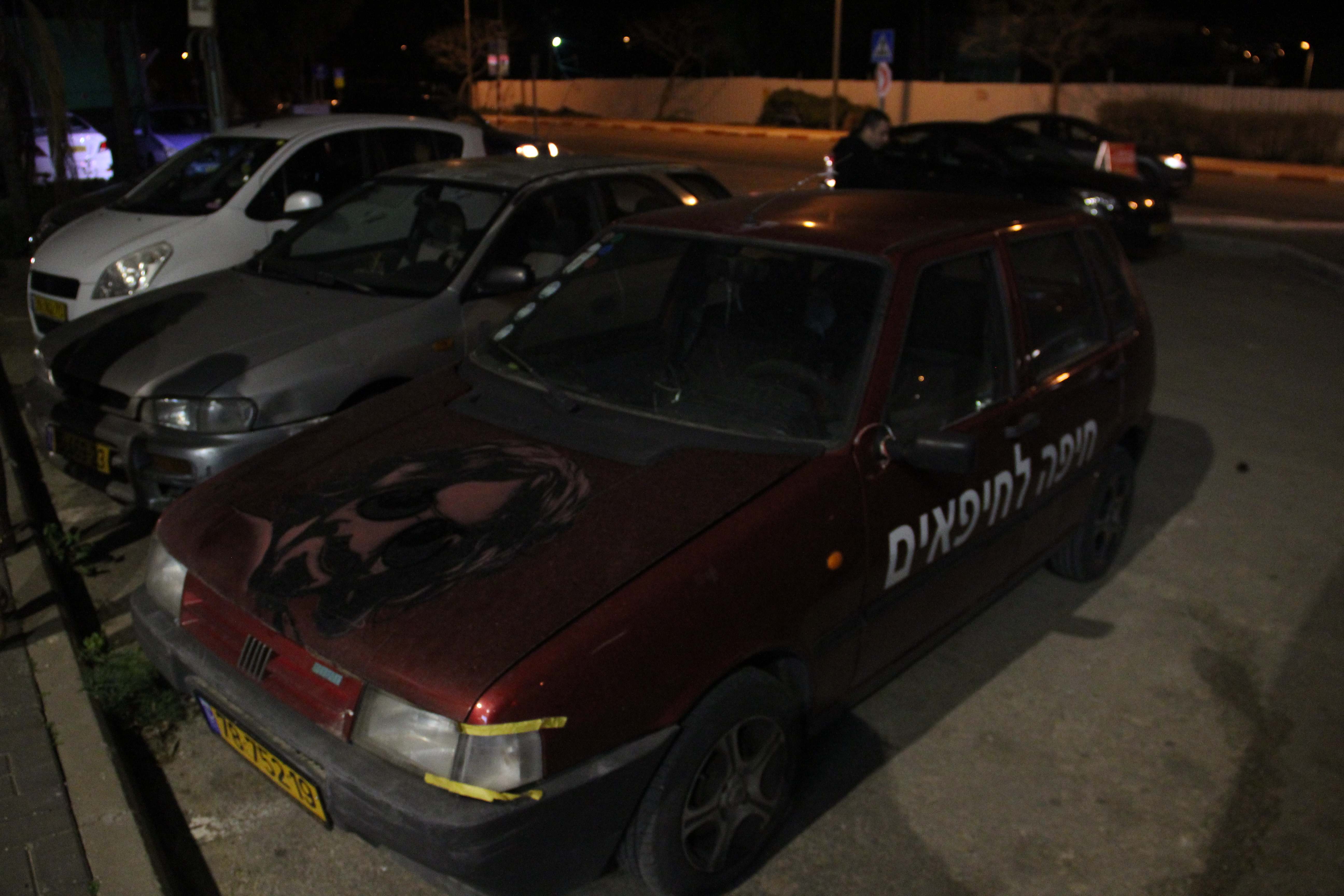 גדי וילצ'רסקי בהופעה בפאב המנדלה בראש פינה, פברואר 2015